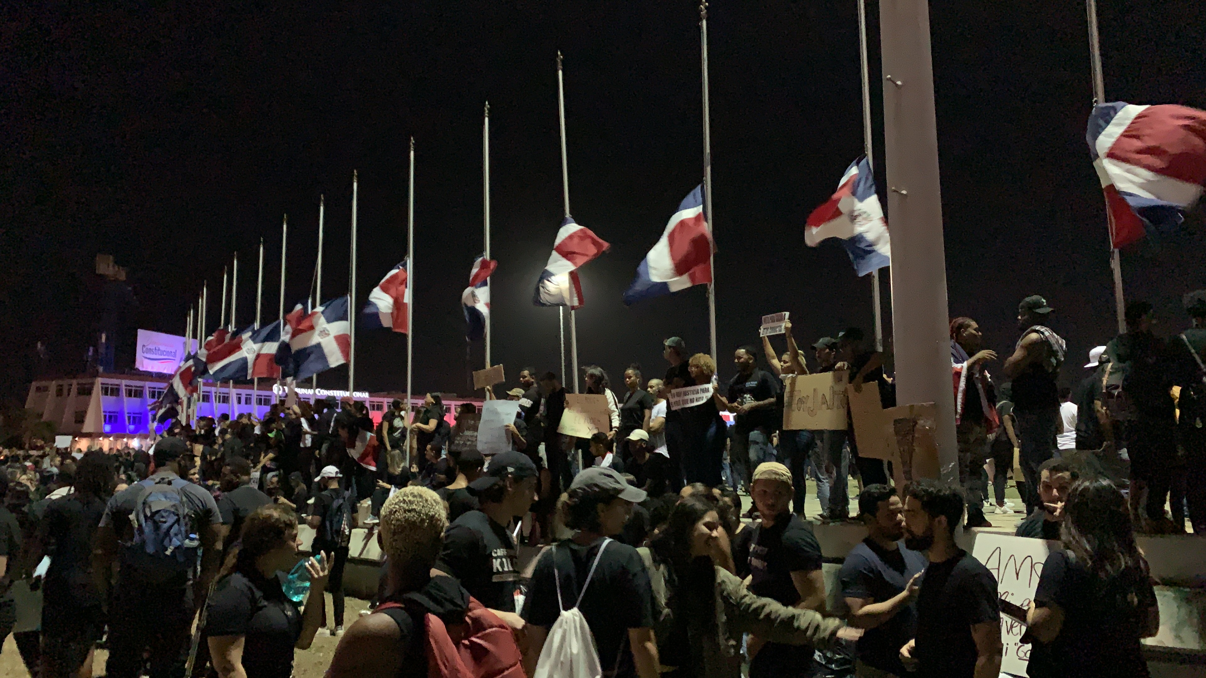 Banderas de la Plaza de la Bandera colocadas a media asta por los ciudadanos protestantes, el miércoles 19 de febrero de 2020, a las 9:25 pm., en Santo Domingo, República Dominicana